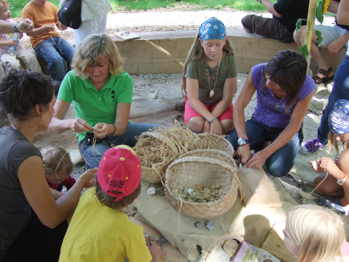 Agieren und lernen in Gruppen sind wichtige Ziele des pädagogischen Konzeptes des Museums.